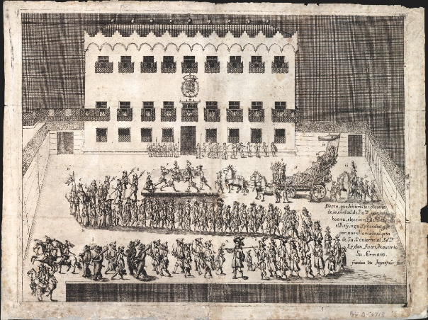 Fiesta de los plateros (1677), aguafuerte de Francesc Via.